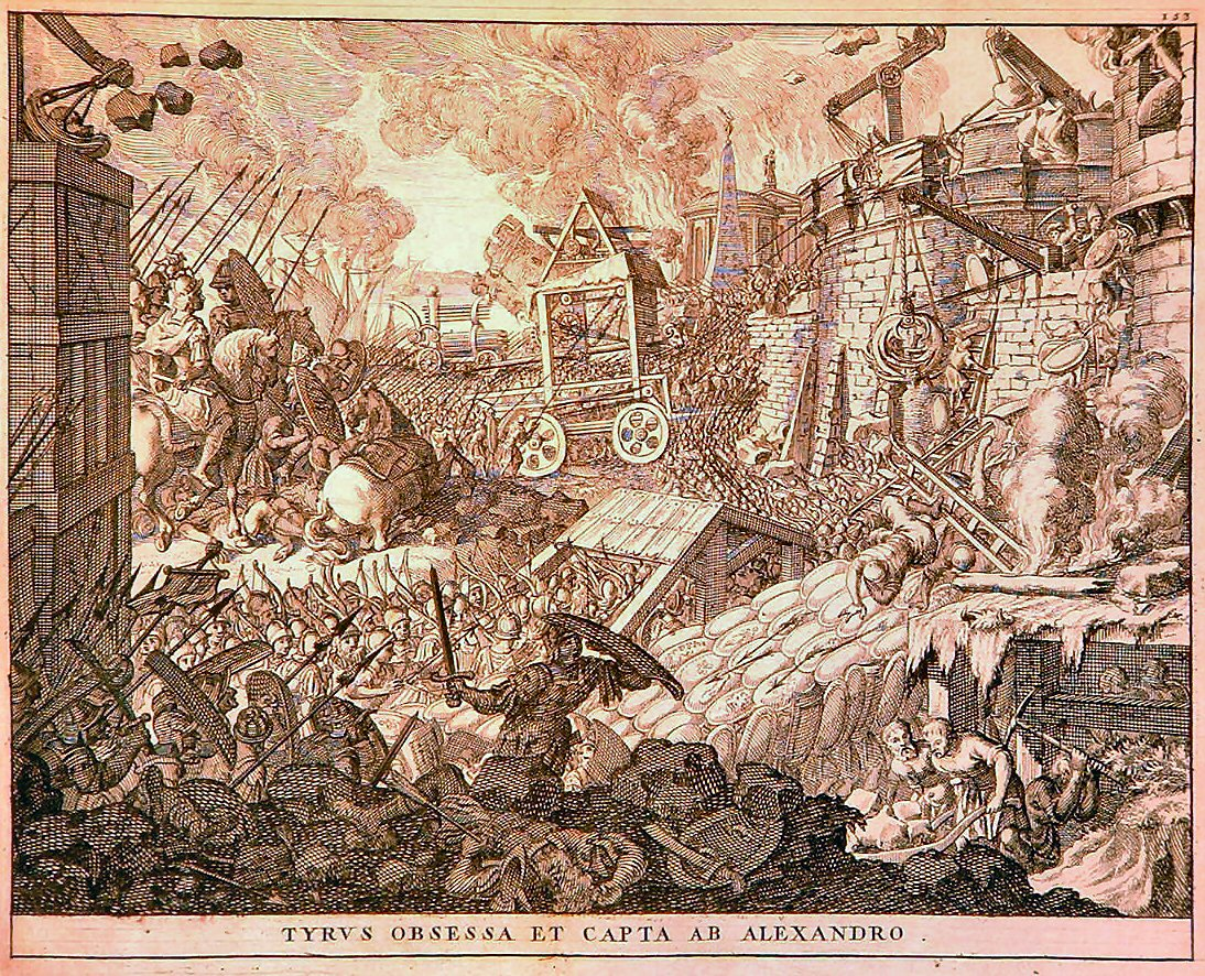 Alexander old drawings